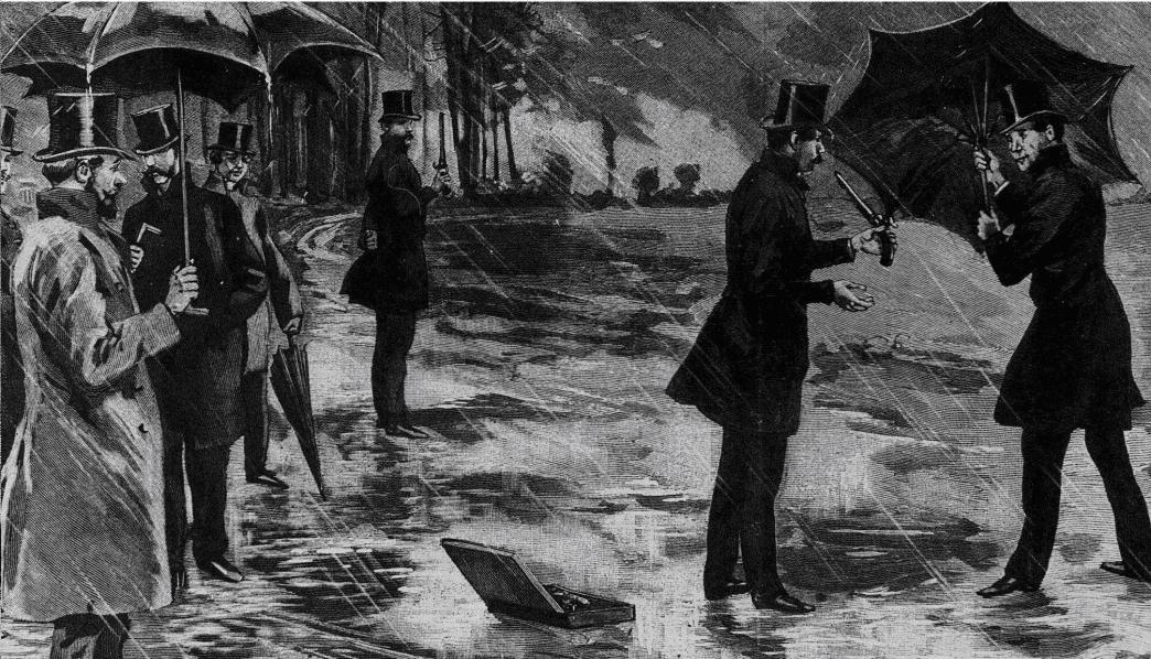 Das Pistolenduell zwischen François Dubois (1793-1874) und Charles-Augustin Sainte-Beuve (1804-1864) am 20. September 1830 im Bois de Romainville (heute Gemeindegebiet von Les Lilas, Seine-Saint-Denis, Frankreich.